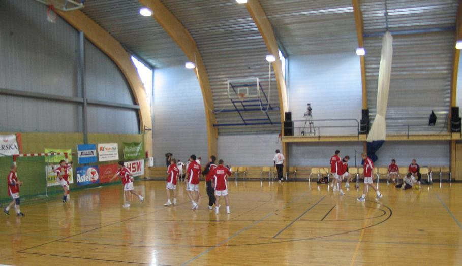 Põlvas asuv Mesikäpa hall